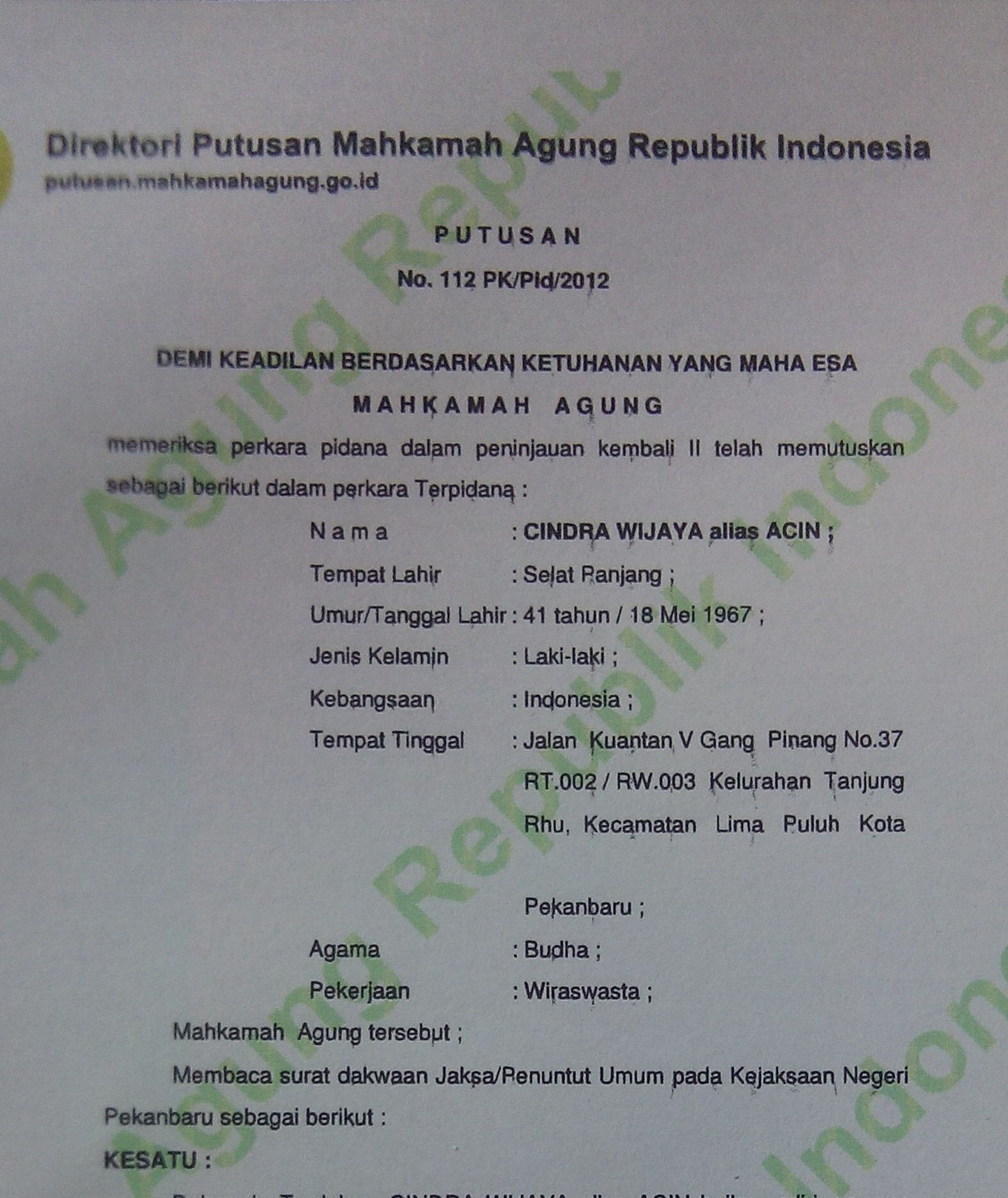 Foto salinan putusan Mahkamah Agung Republik Indonesia terhadap permohono Peninjauan Kembali yang diajukan oleh Cindra Wijaya alias Acin, seorang wiraswasta Indonesia. Salinan putusan didapatkan dari website resmi Mahkamah Agung. Salinan putusan tersebut bersifat bebas untuk publik.